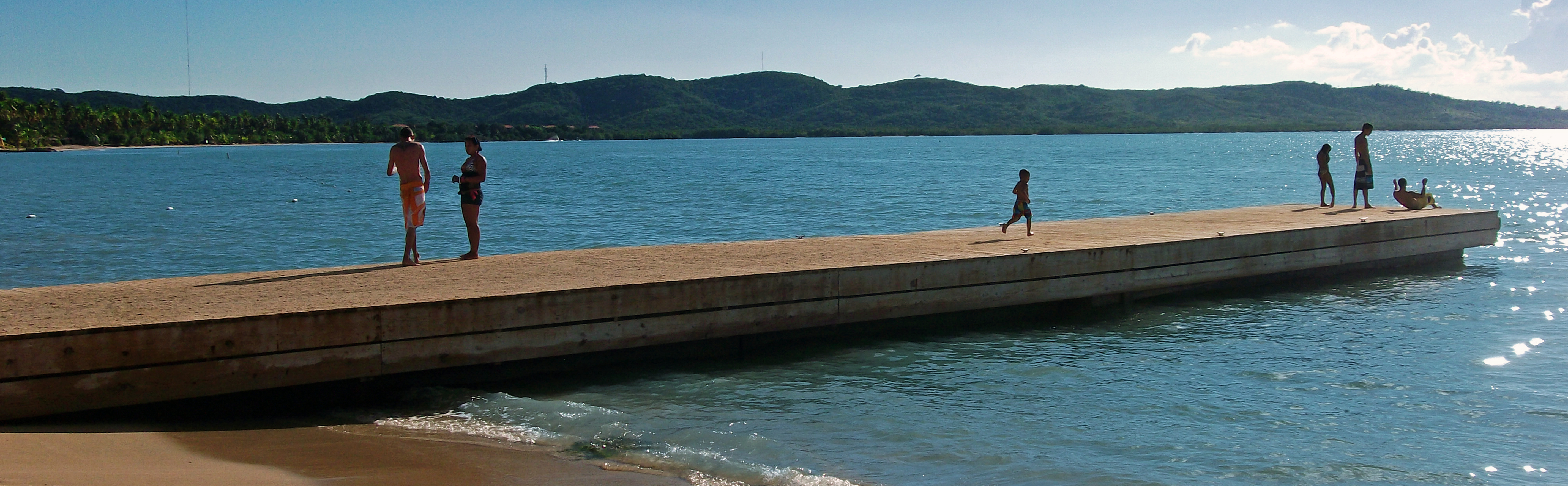 Playa de Boquerón.